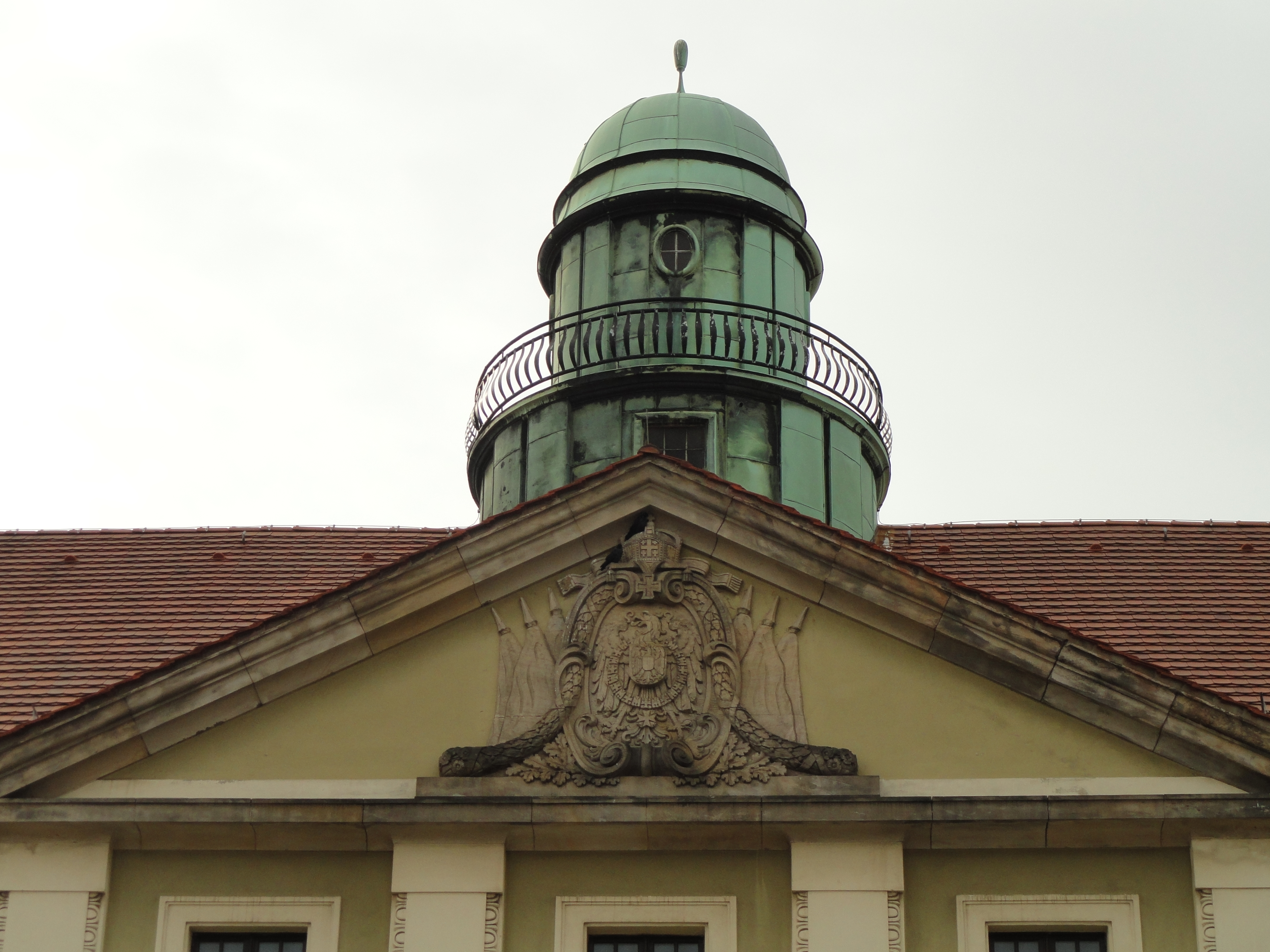 Turm und Mittelrisalit des Bahnpostamts Görlitz